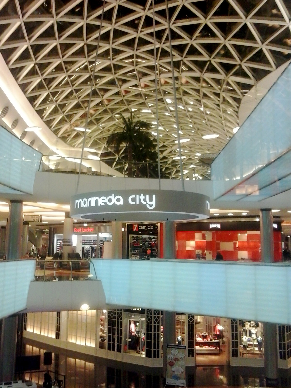 Vista de Marineda City A Coruña